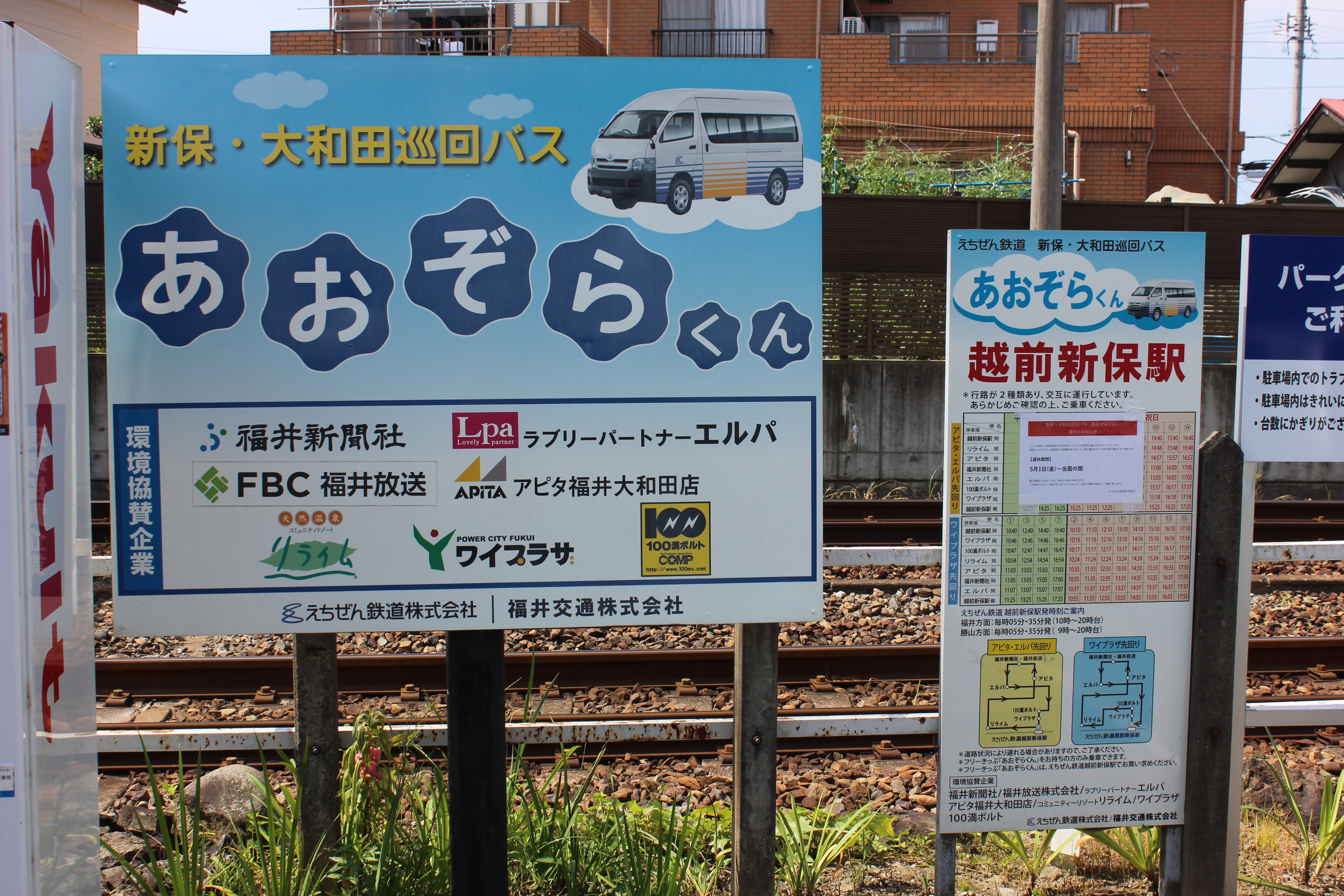 越前新保駅前にある「あおぞらくん」のバス停・時刻表